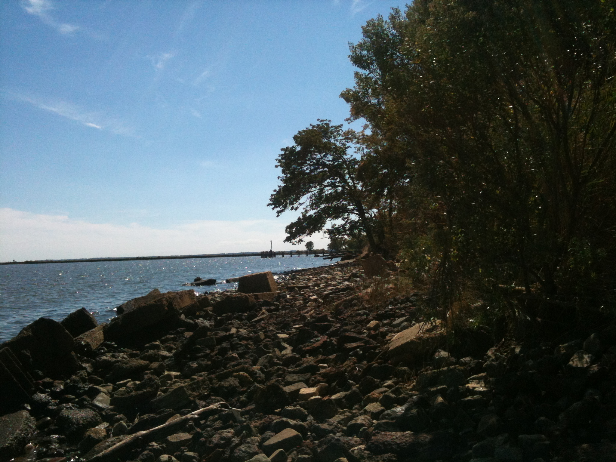 Edgemere, MD 21219, USA